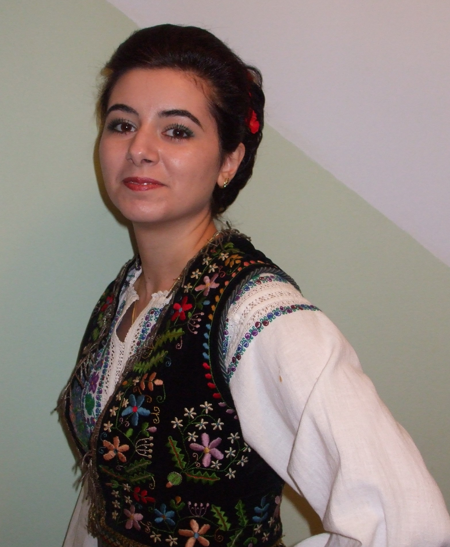 Isabela Tomița